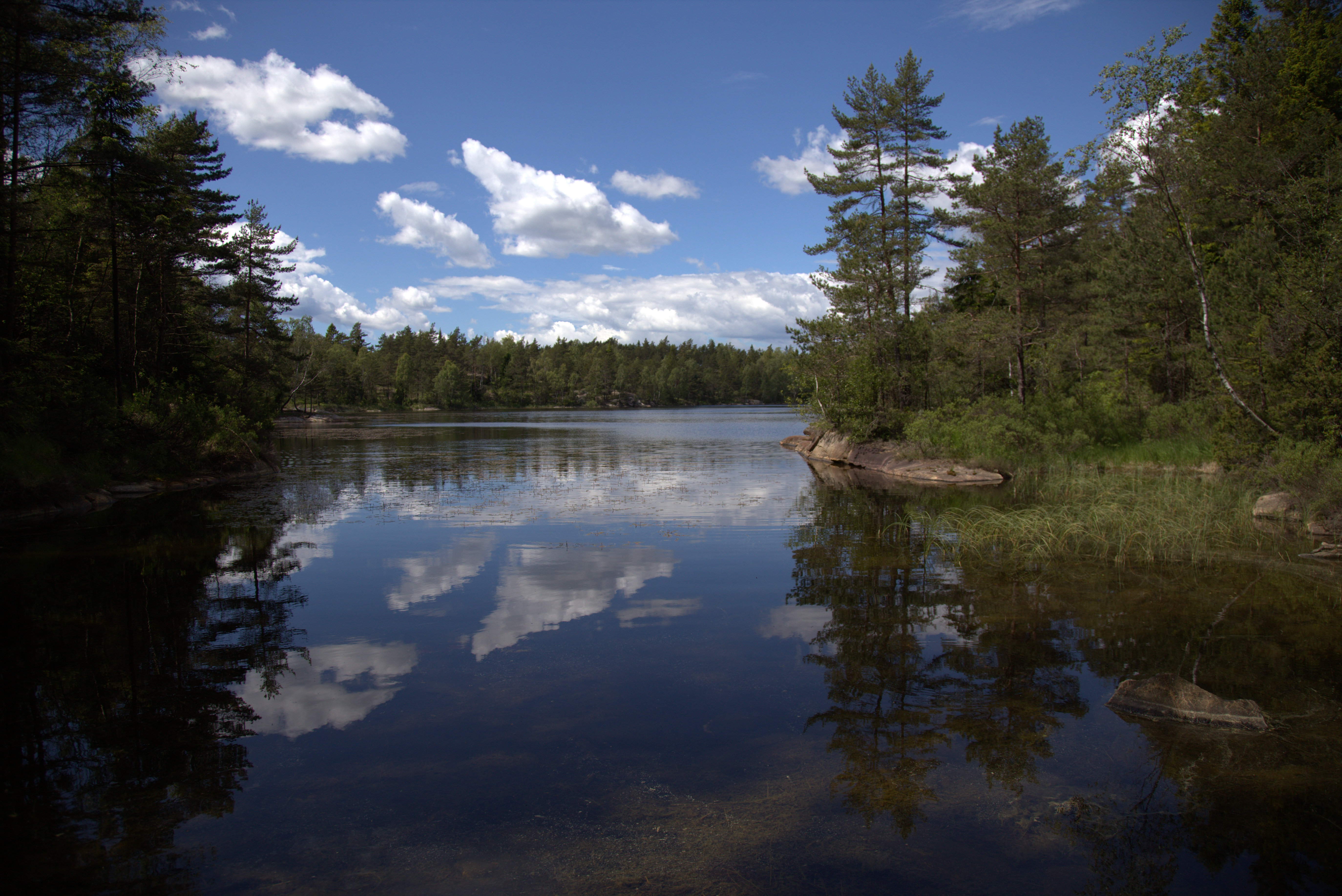 Krokvatten sedd från dess sydöstra ände.